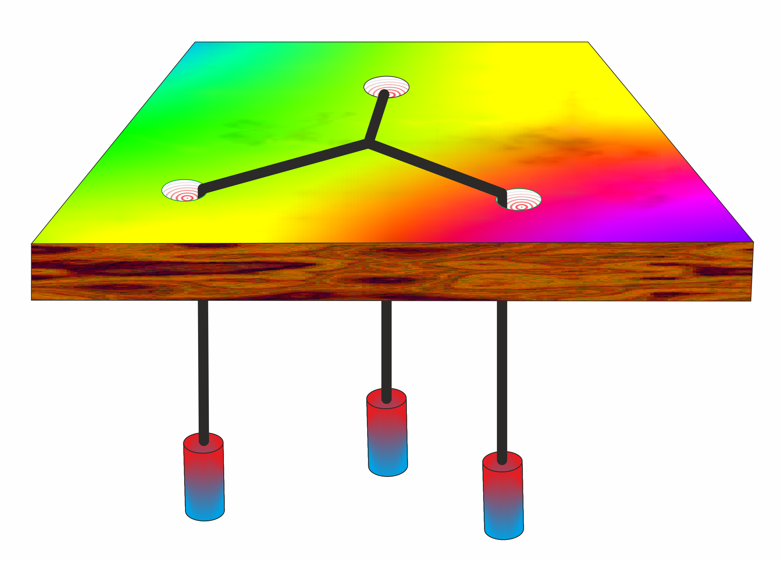 Экспериментальное построение точки Ферма